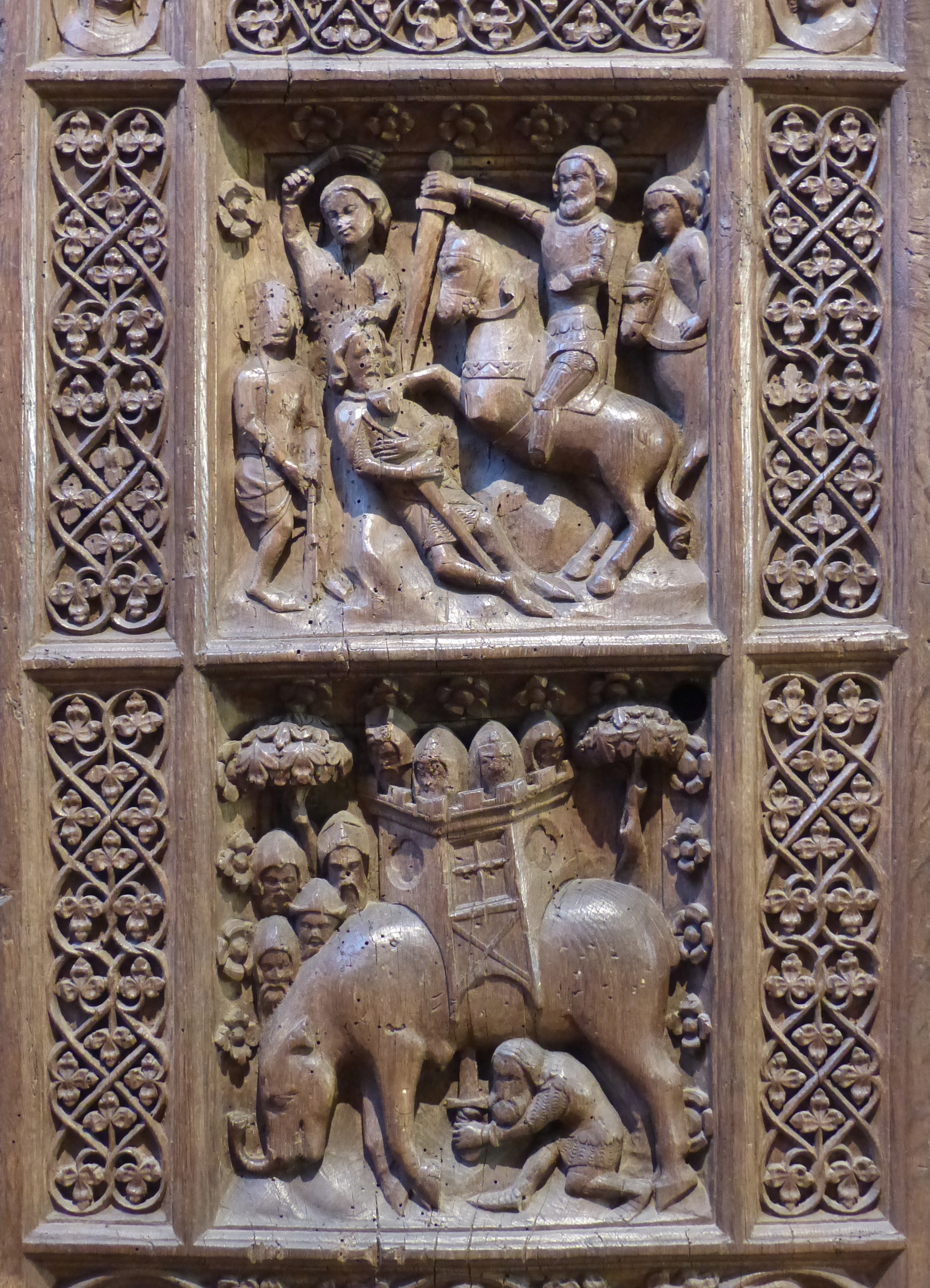 Bremer Dom, 3. Kapelle von Westen, 8. Chorgestühlswange. Oben: Tod des Jonathan (1 Makk 12, 48) oder des Judas Makkabäus (1 Makk 9, 18), unten: Eleazar tötet den Kriegselefanten des Königs Antiochus. Eichenholz, um 1360-70)